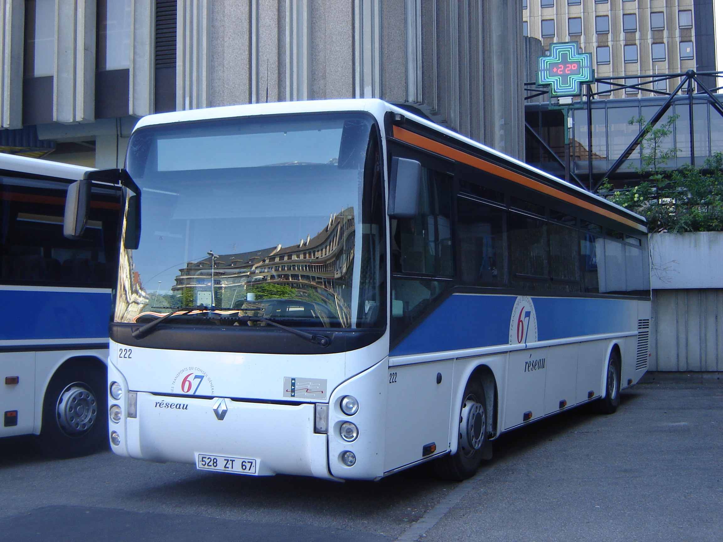 Renault Ares du Réseau 67 (Réseau départemental du Bas-Rhin)